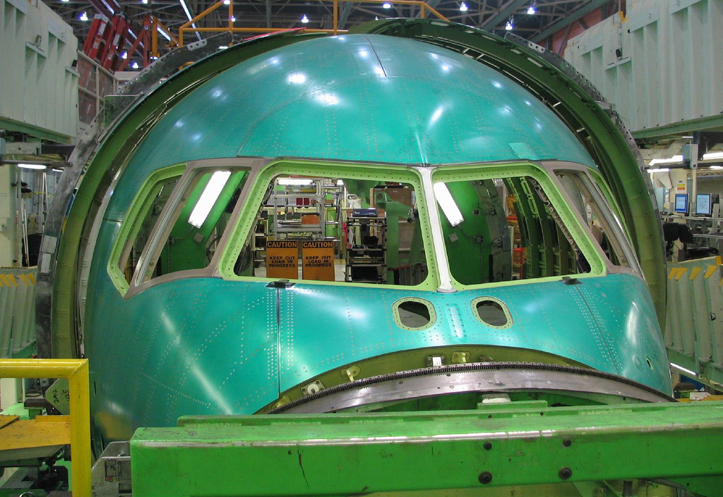 Everett assembly line